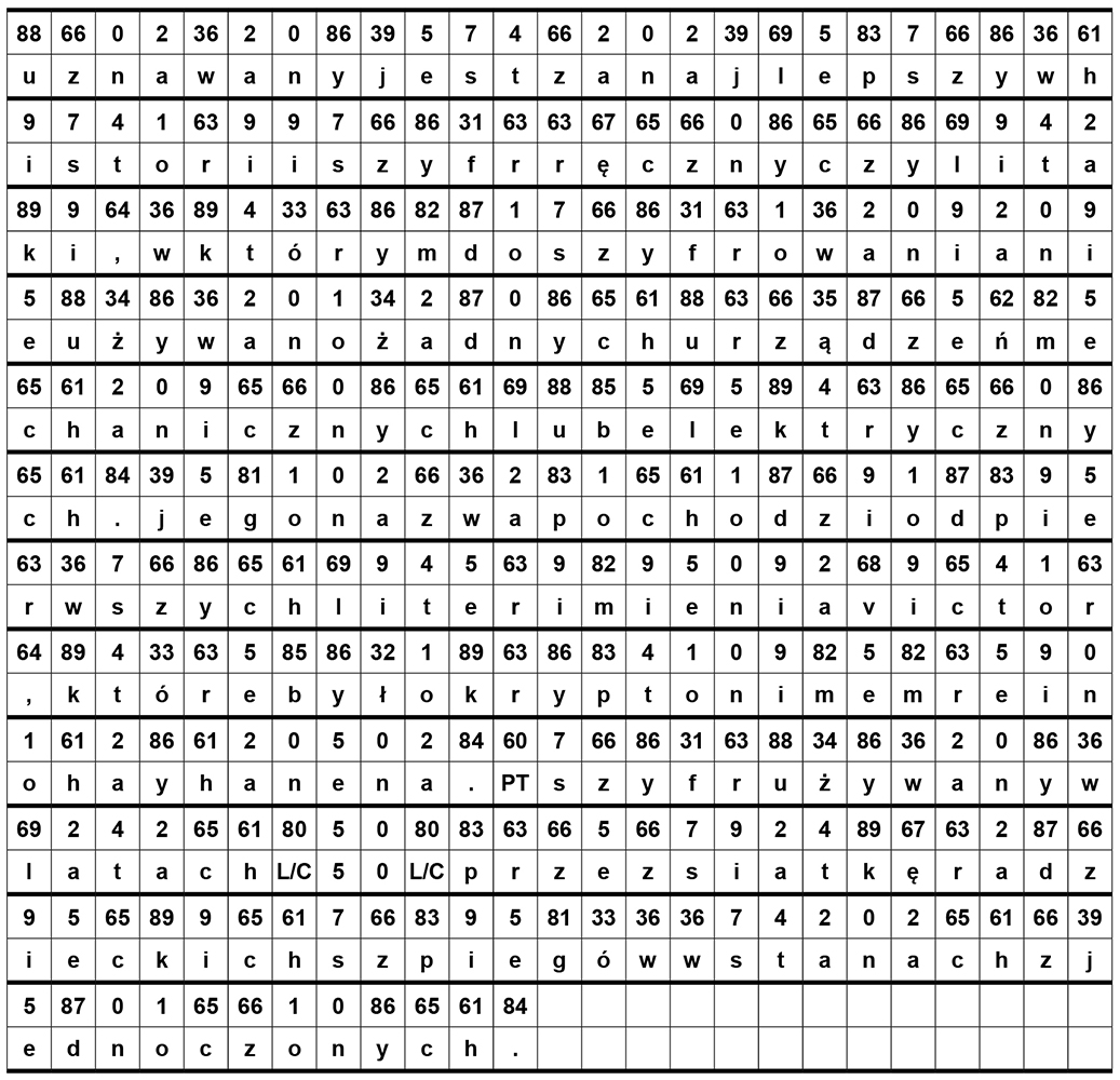 Szyfrowanie tekstu szyfrem VIC – tekst wstępnie przekształcony szachownicą.